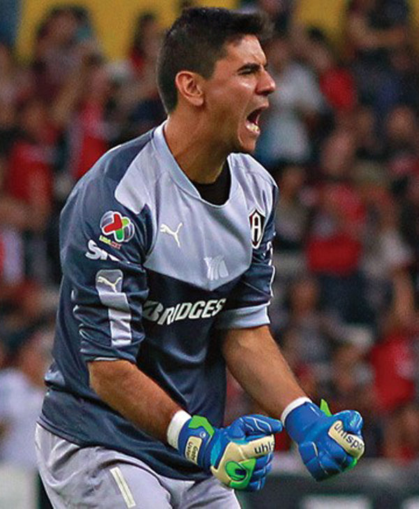 atlas vs pumas unam